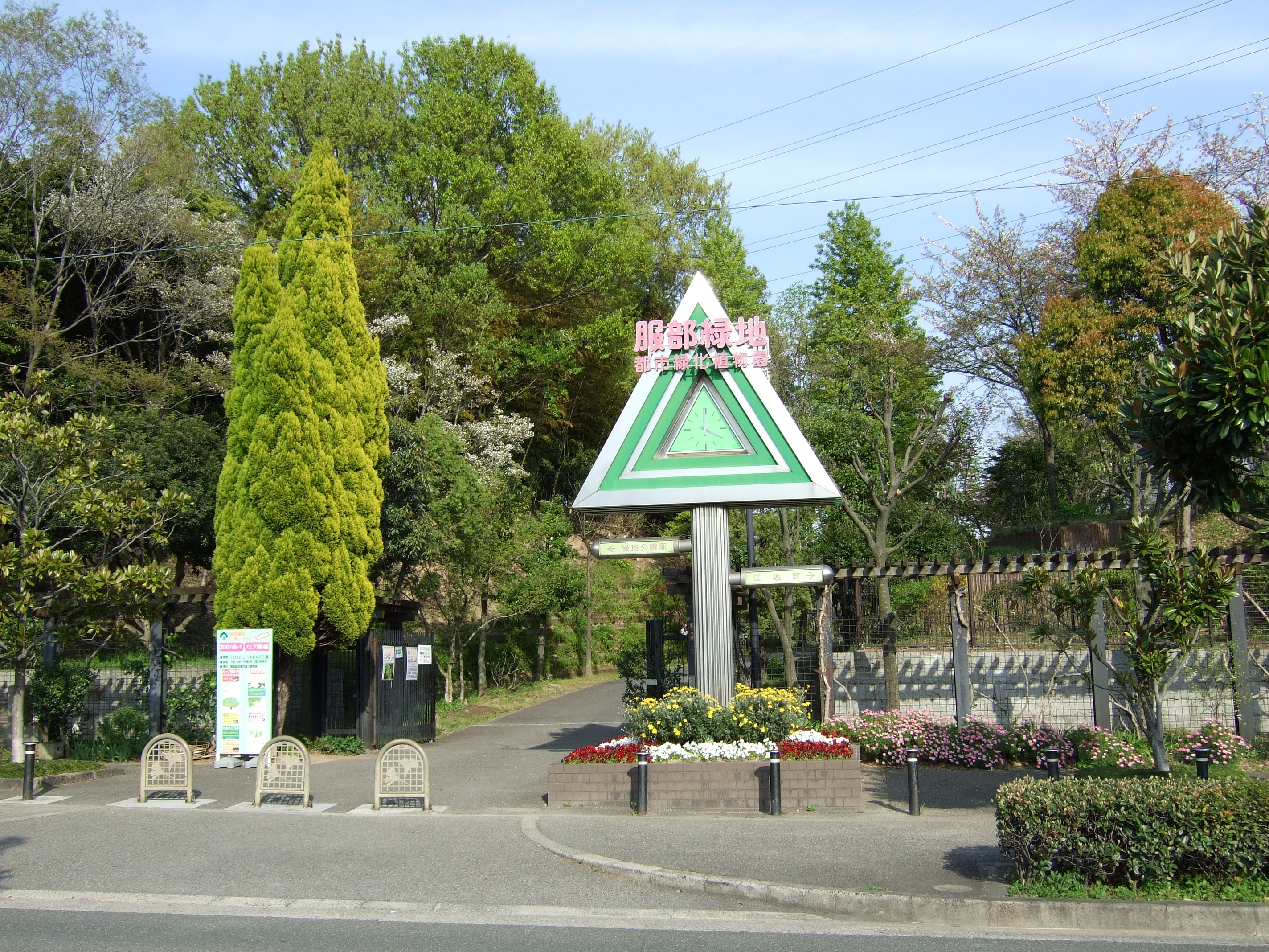 Toyonaka Hattori Ryokuchi